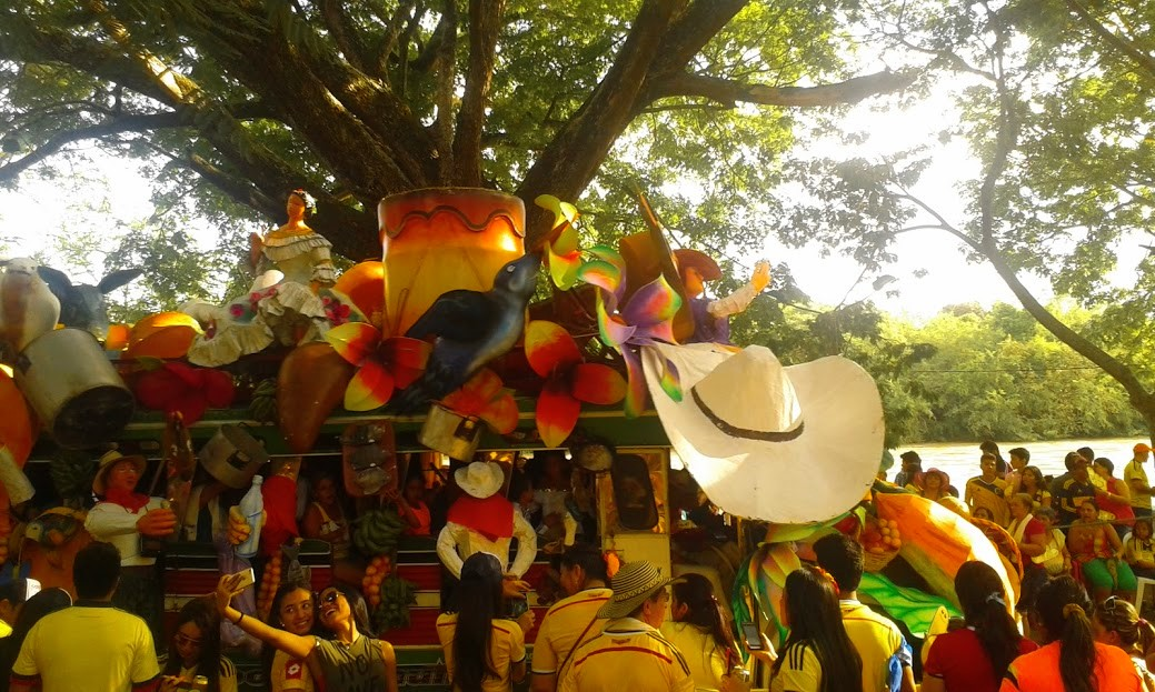 Fiestas de San Pedro, Neiva, Huila. Esta fotografía fue tomada en el municipio colombiano con código 41001.